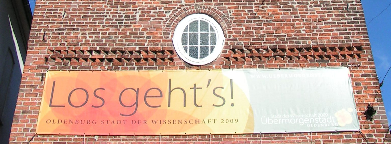 Schriftzug "Oldenburg Stadt der Wissenschaft 2009" am Lappan